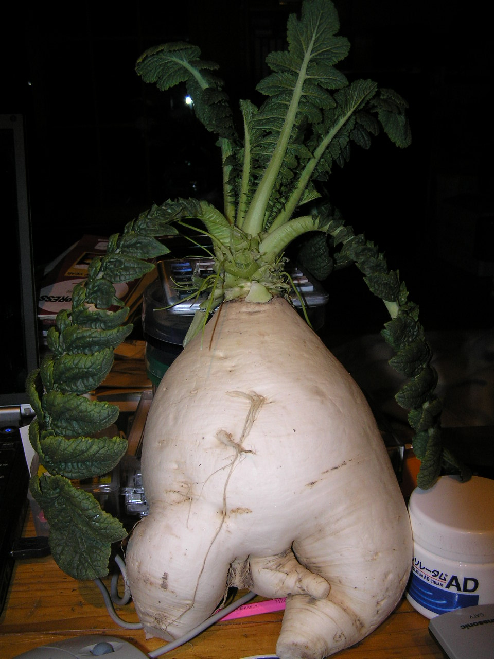 風変わりな形の大根。固い土や小石の多い畝で栽培した場合に多く見られる。それにしてもここまで出来ているものは珍しい。 ～photo by Autumn Snake 【おぉたむ すねィく探検隊】